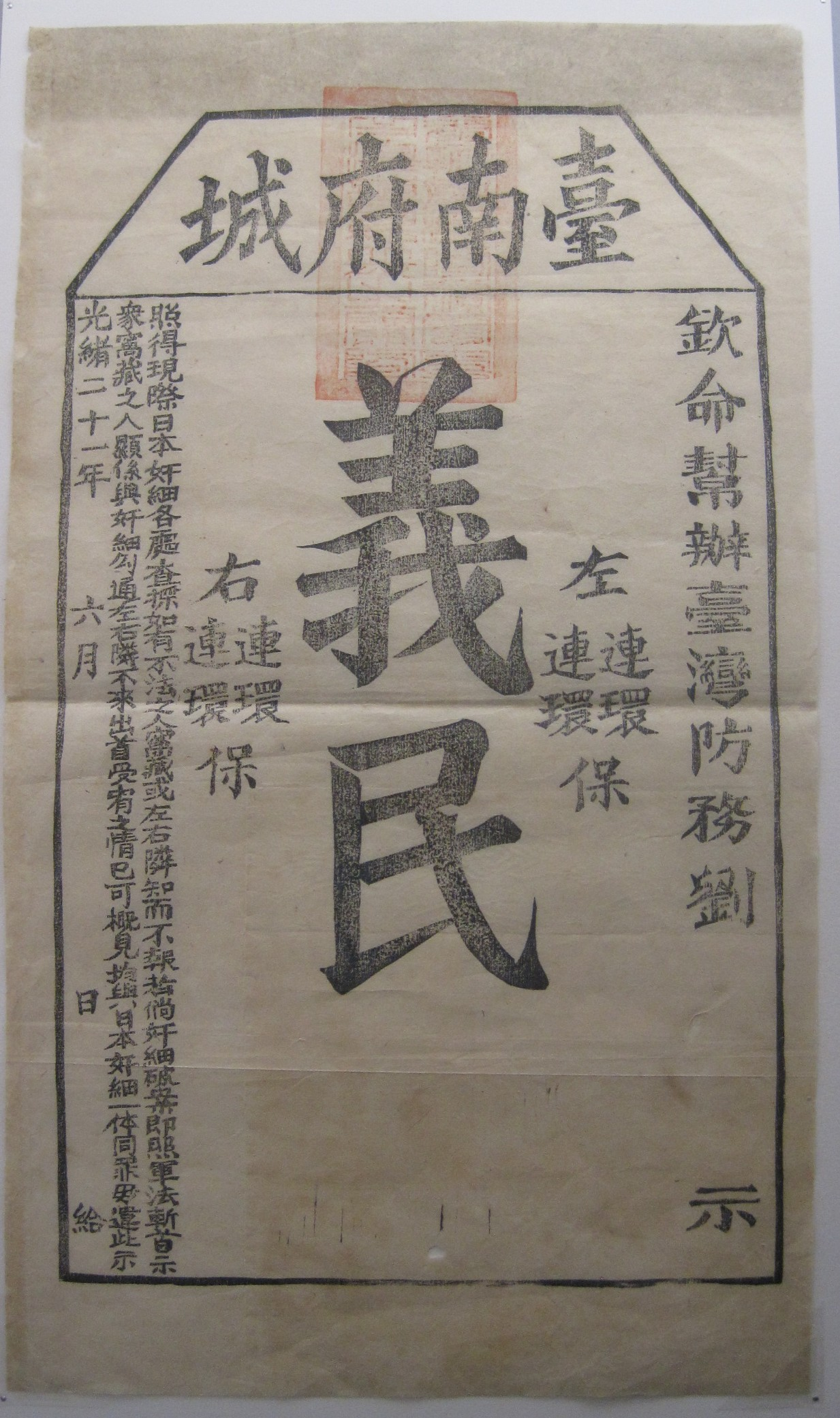 臺南府城義民牌。攝於臺灣歷史博物館。